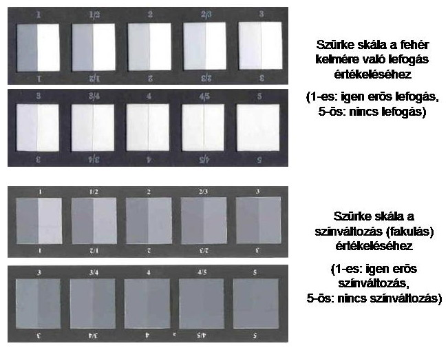 Szürke skála a textilanyagok színváltozásának és lefogásának értékeléséhez